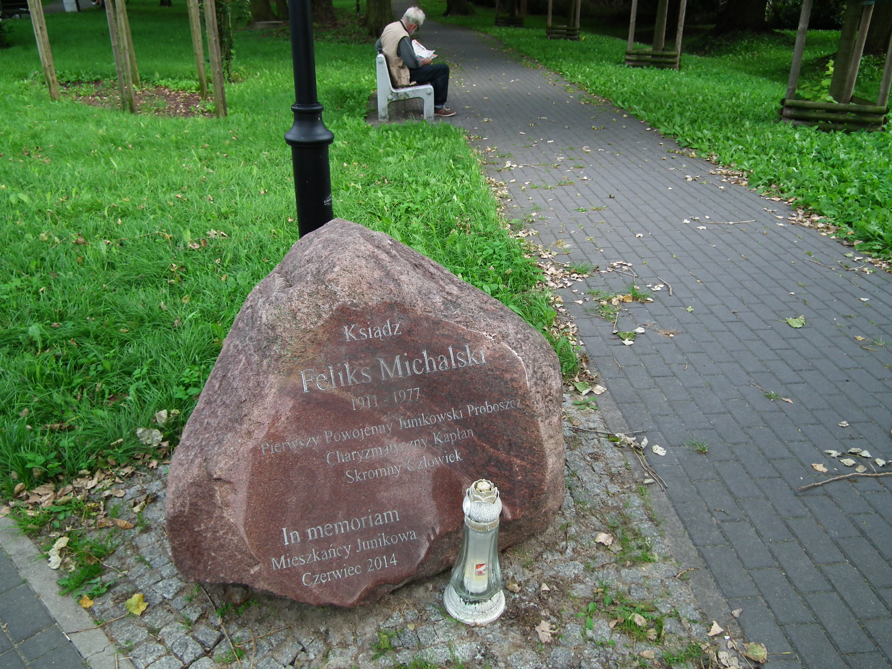 Park Feliksa Michalskiego w Poznaniu na Junikowie.